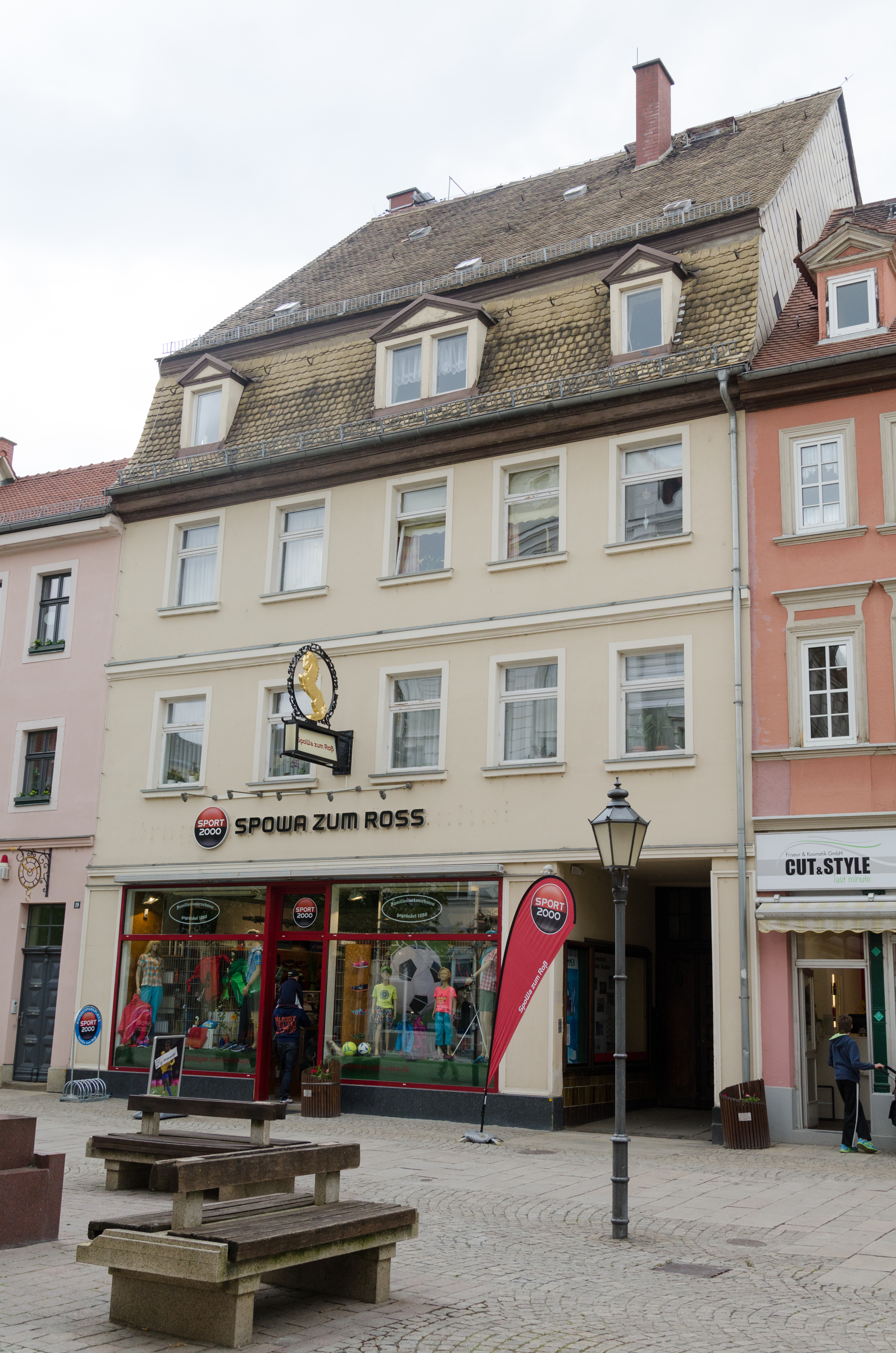 Zeitz, Roßmarkt 18